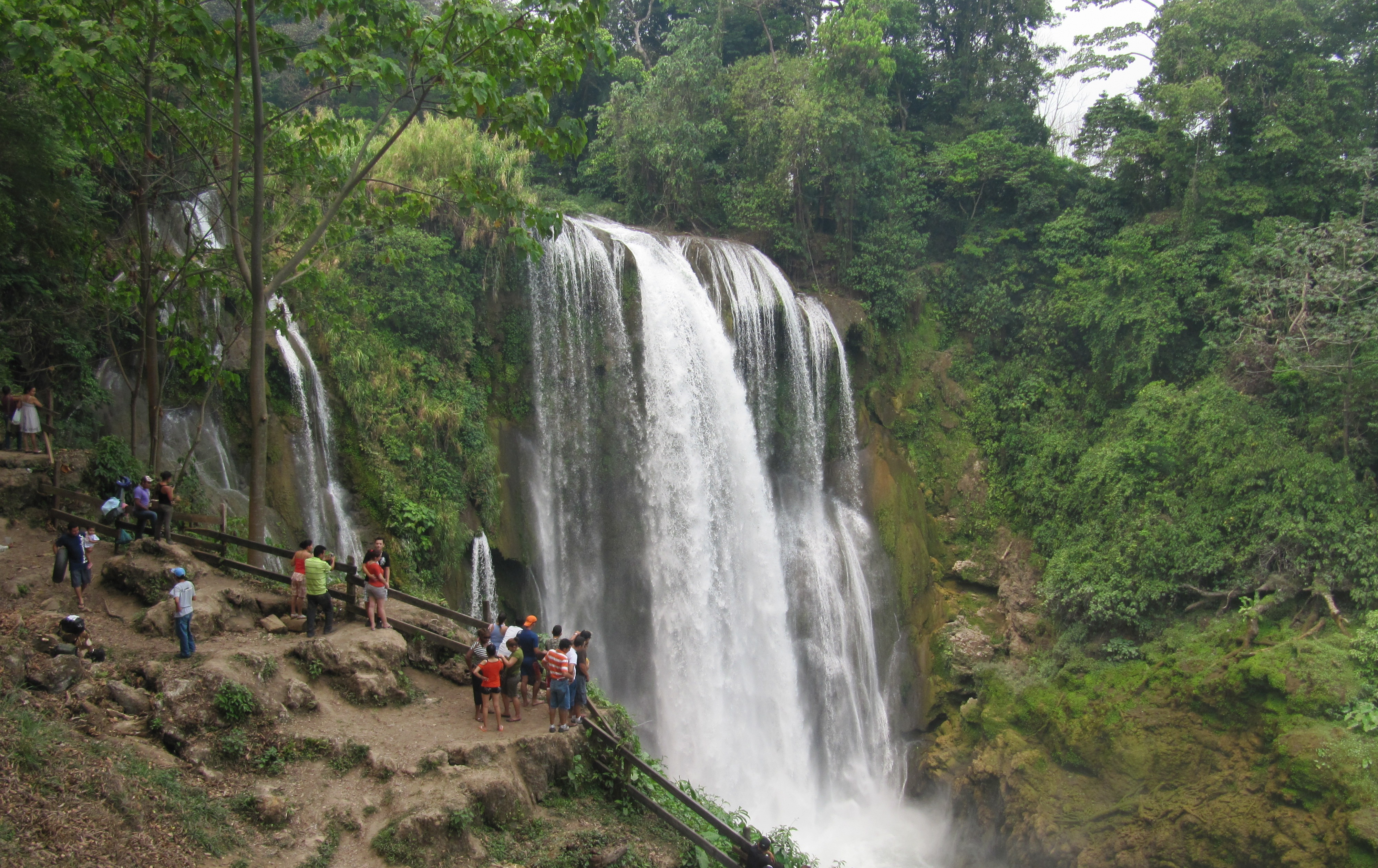 Cataratas de Pulhapanzak (II).